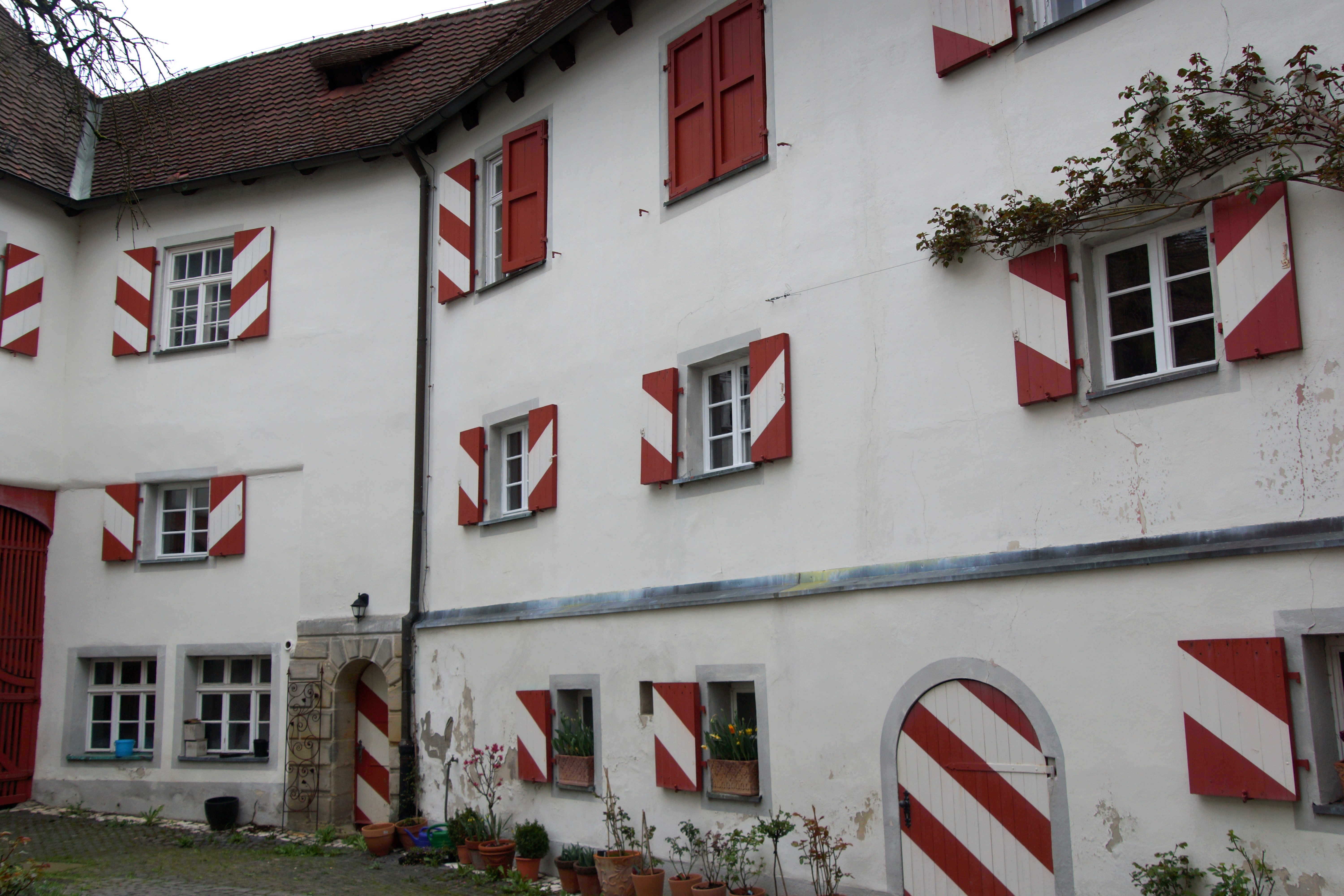 Das sogenannte Pfinzingschloss in Henfenfeld